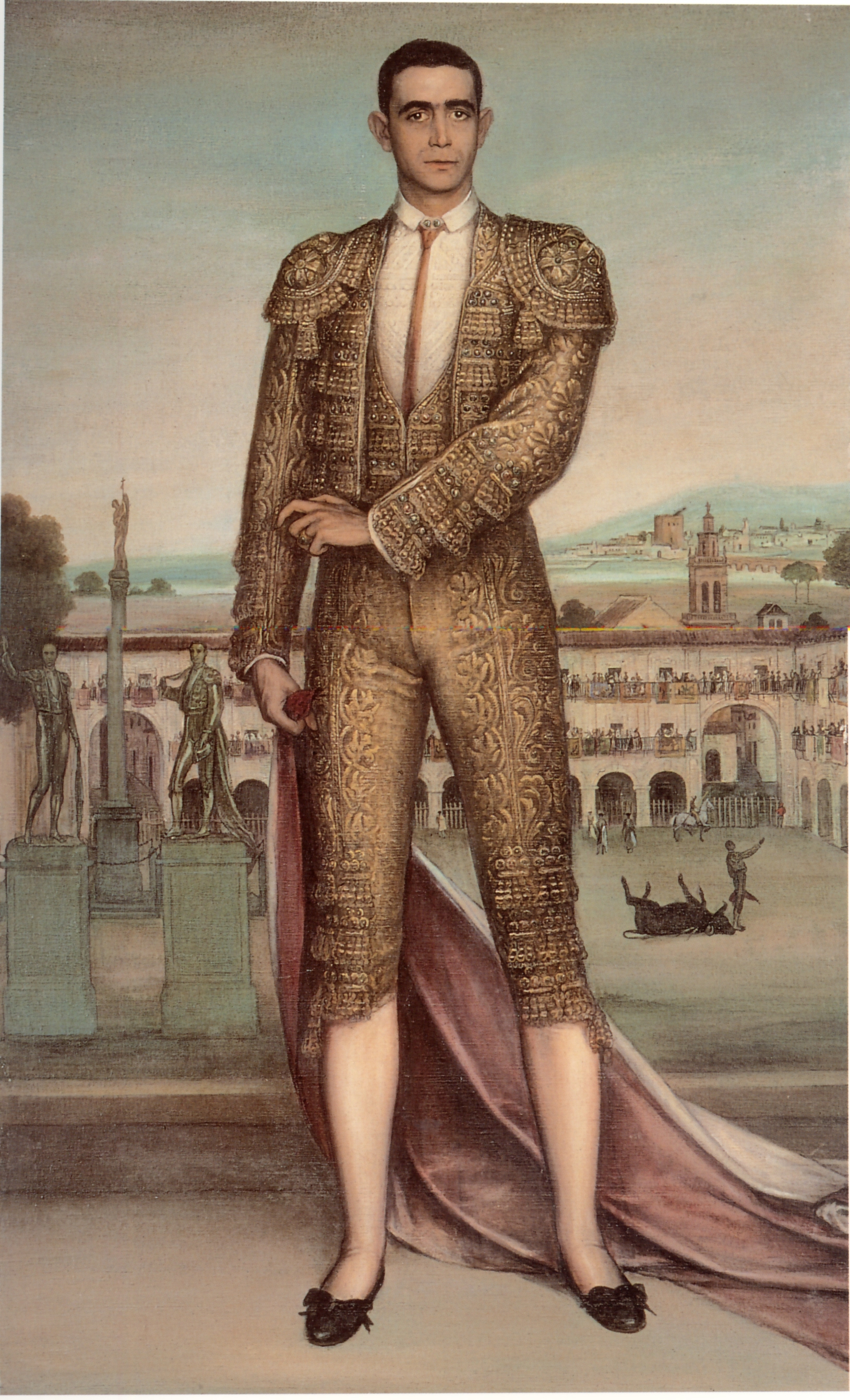 La obra representa al célebre torero cordobés Rafael González Madrid (1880-1955), más conocido por su apodo de Machaquito.